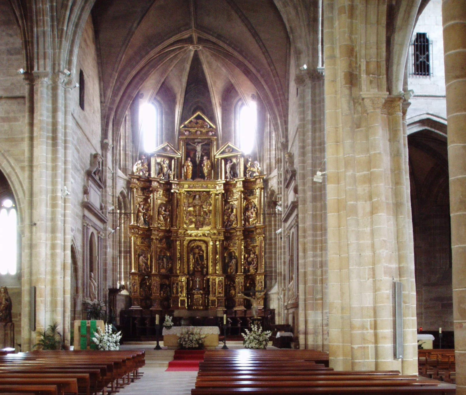 Colegiata de San Miguel (interior). Aguilar de Campoo. Palencia. España